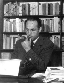 Dante Arfelli (1921 - 1995)